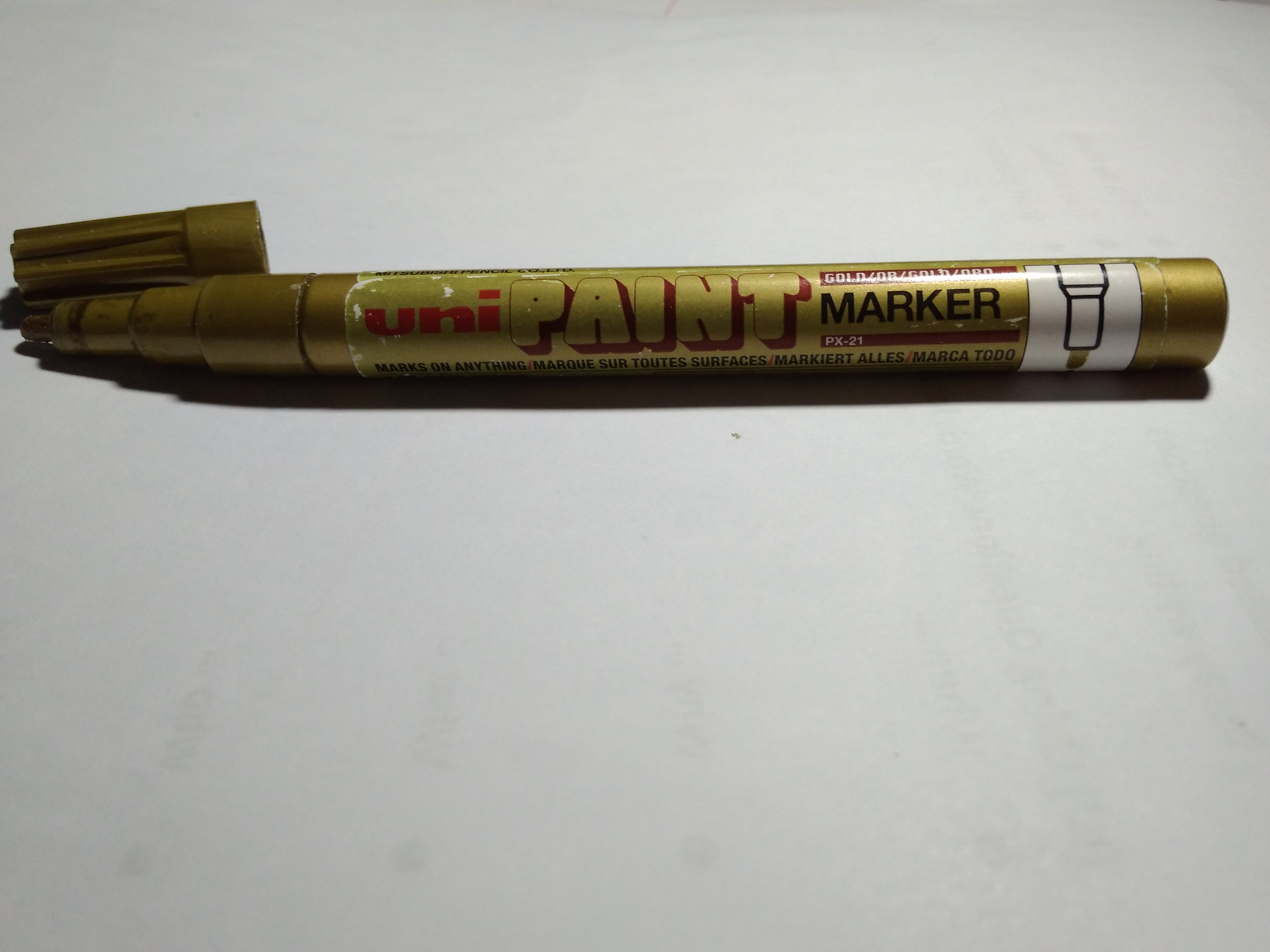 gcm